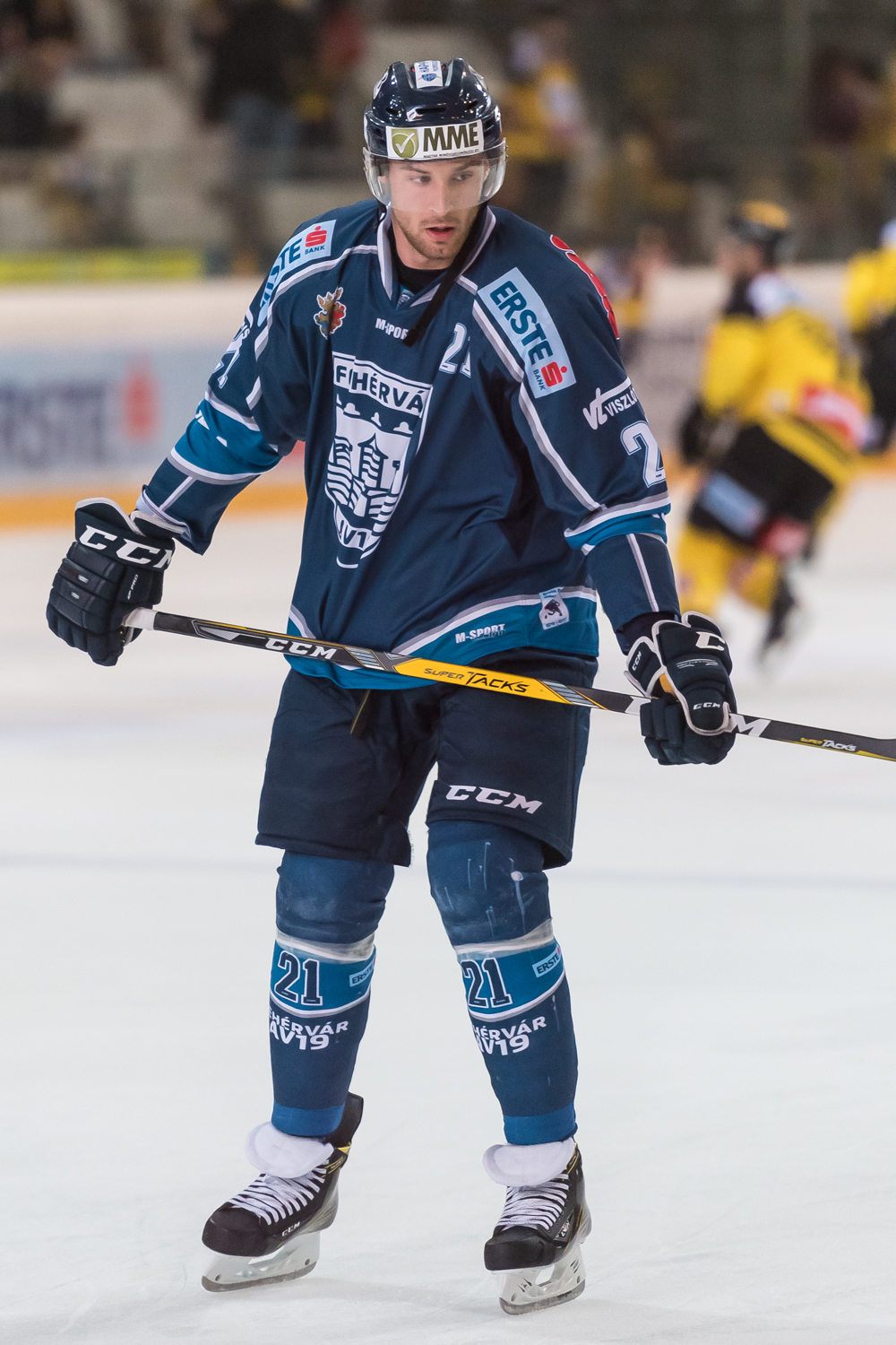 Erste Bank Eishockey Liga - UPC Vienna Capitals vs SAPA Fehervar AV19 am 14. Oktober 2016. Bild zeigt Daniel Koger (AVS).